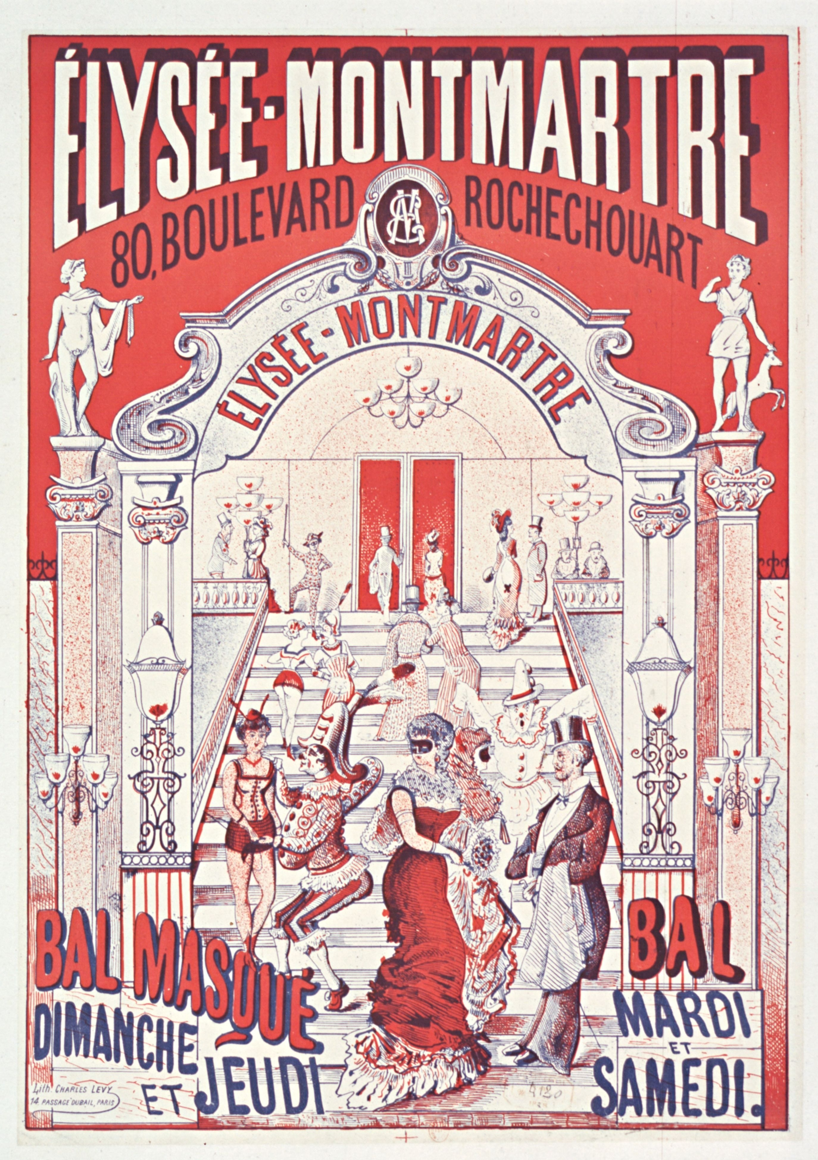 Elysée-Montmartre... bal masqué dimanche et jeudi, bal mardi et samedi : affiche